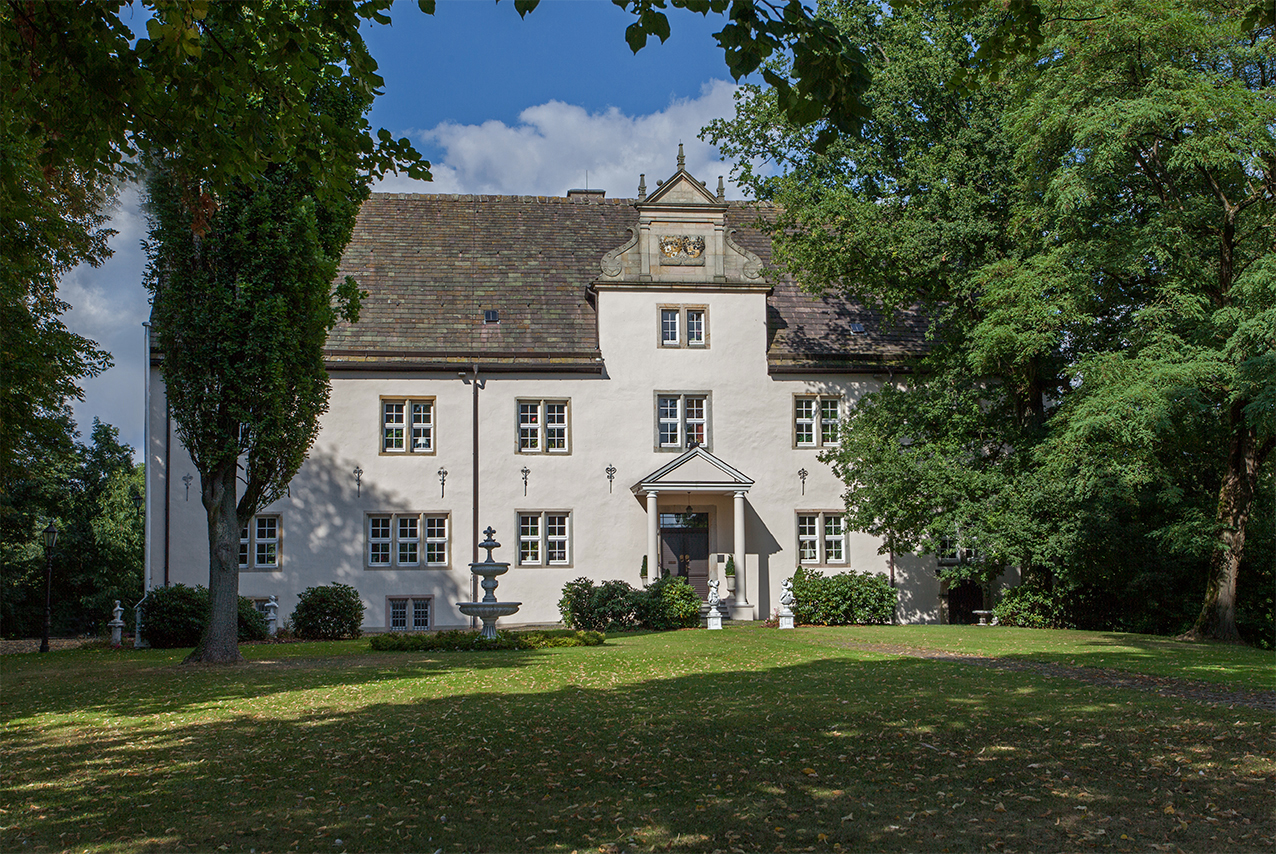 Schloss Alverdissen, Südseite This is a photograph of an architectural monument.